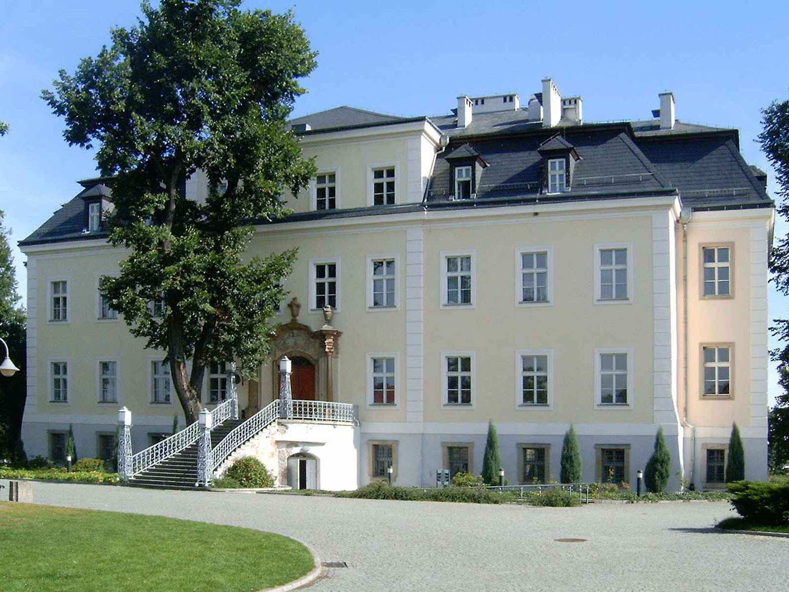 Krzyżowa